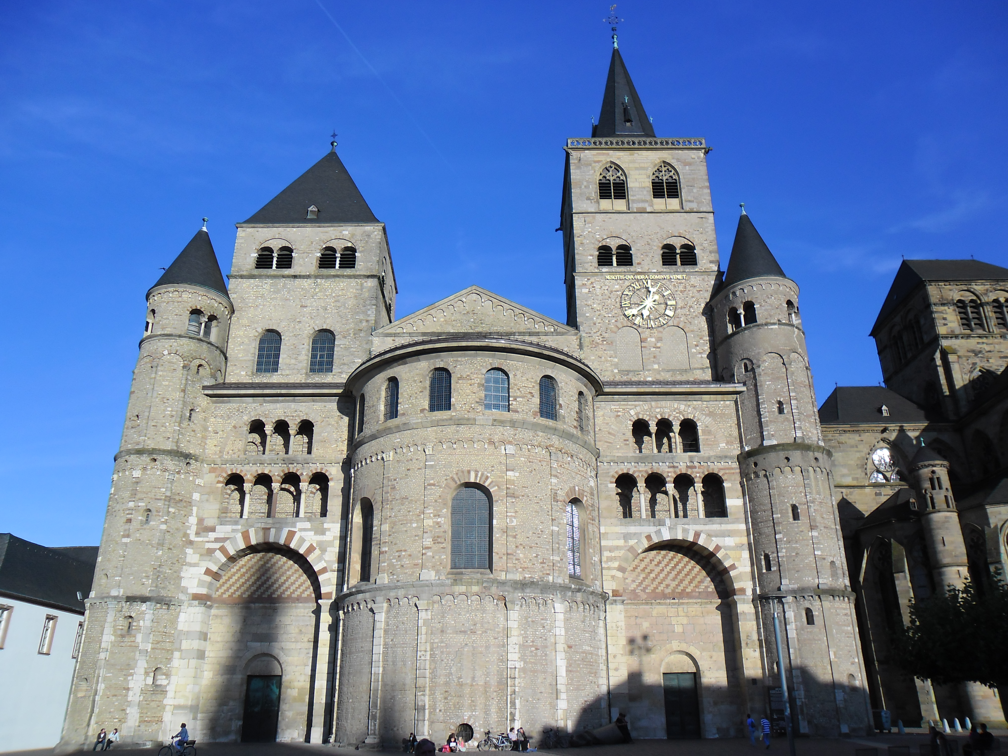 Il duomo di Treviri, dedicato a S. Pietro, è la più antica cattedrale della Germania. Ho scattato la foto dalla piazza del duomo mentre ero in visita a Treviri nel corso di un mio viaggio in Germania nel settembre 2012.